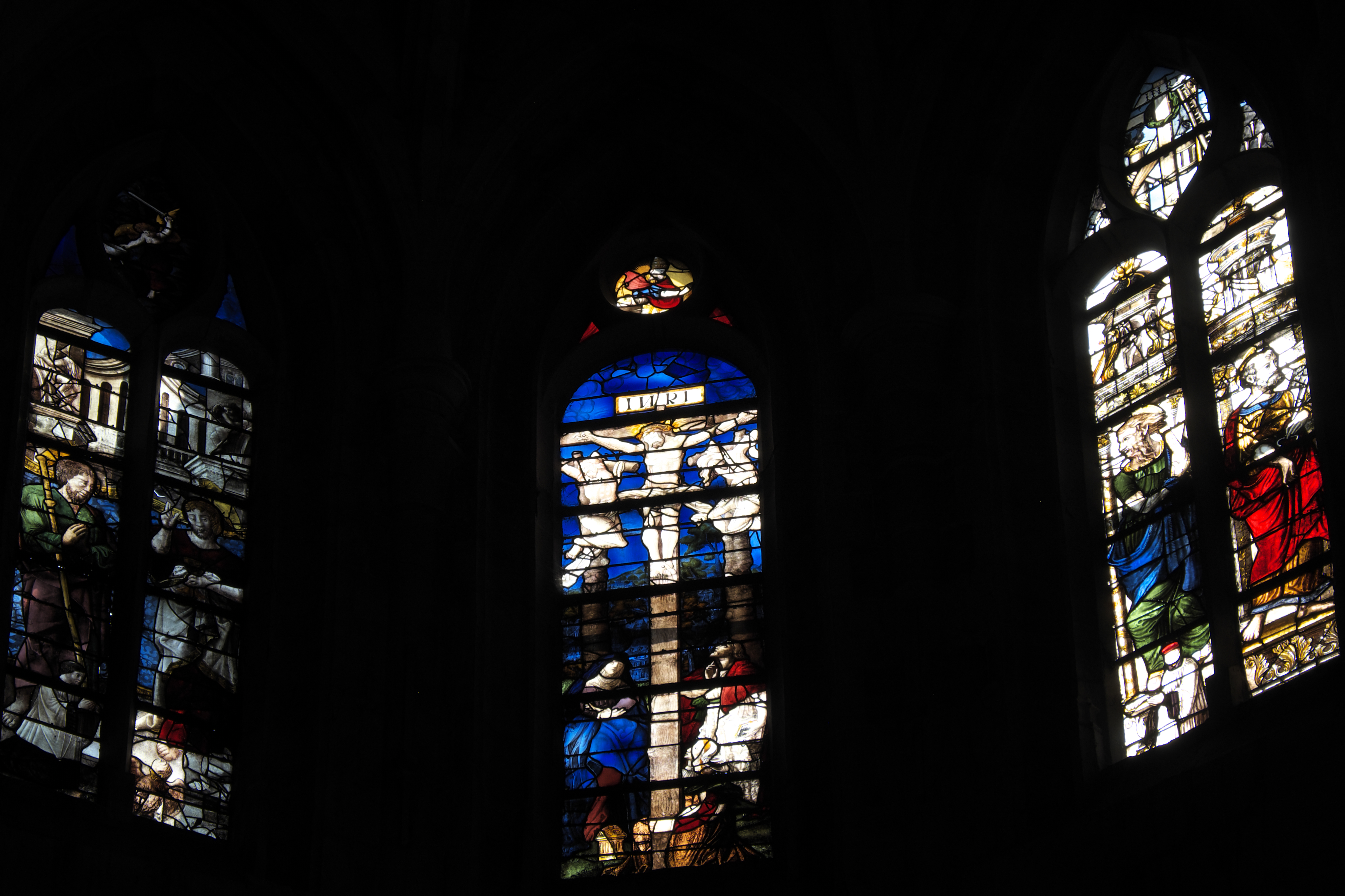 Katholische Pfarrkirche Saint-Pierre in Montfort-l'Amaury im Département Yvelines (Region Île-de-France/Frankreich), obere Bleiglasfenster im Chor (baies 101, 100, 102) aus der Mitte und zweiten Hälfte des 16. Jahrhunderts; Darstellung: Apostel Jakobus und Johannes, Kreuzigung Christi, Apostel Petrus und Andreas